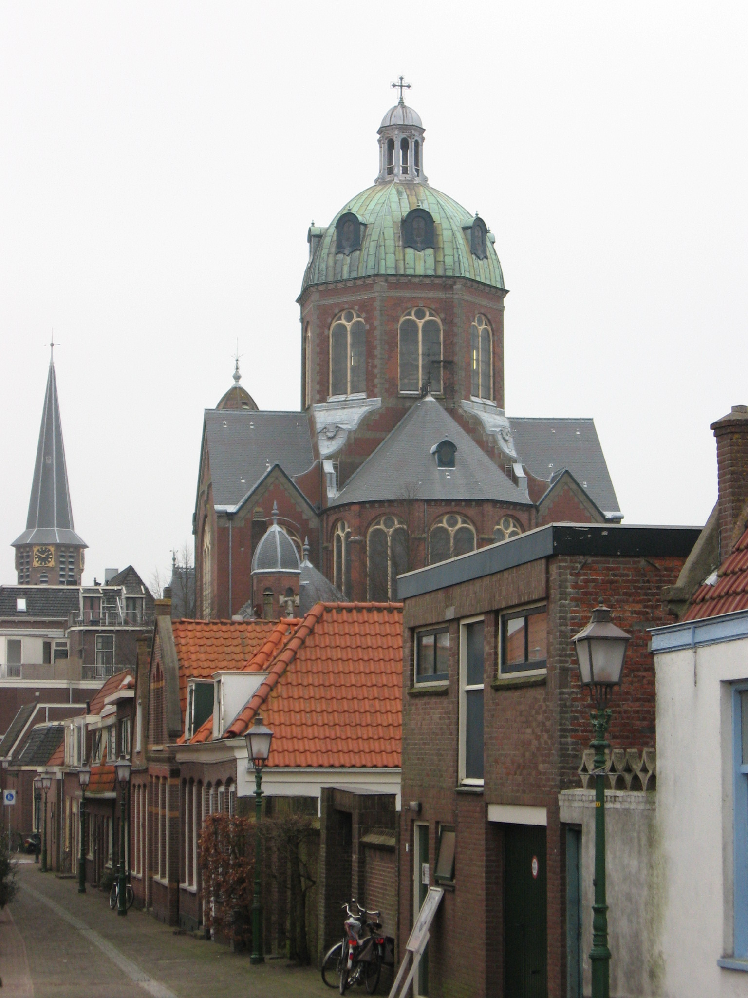 Hoorn, dec 2006